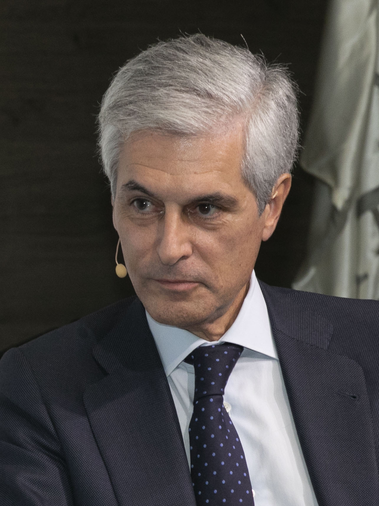 Conferencia Adolfo Suarez Illana dentro del FORO MADRID del Partido Popular de Madrid.